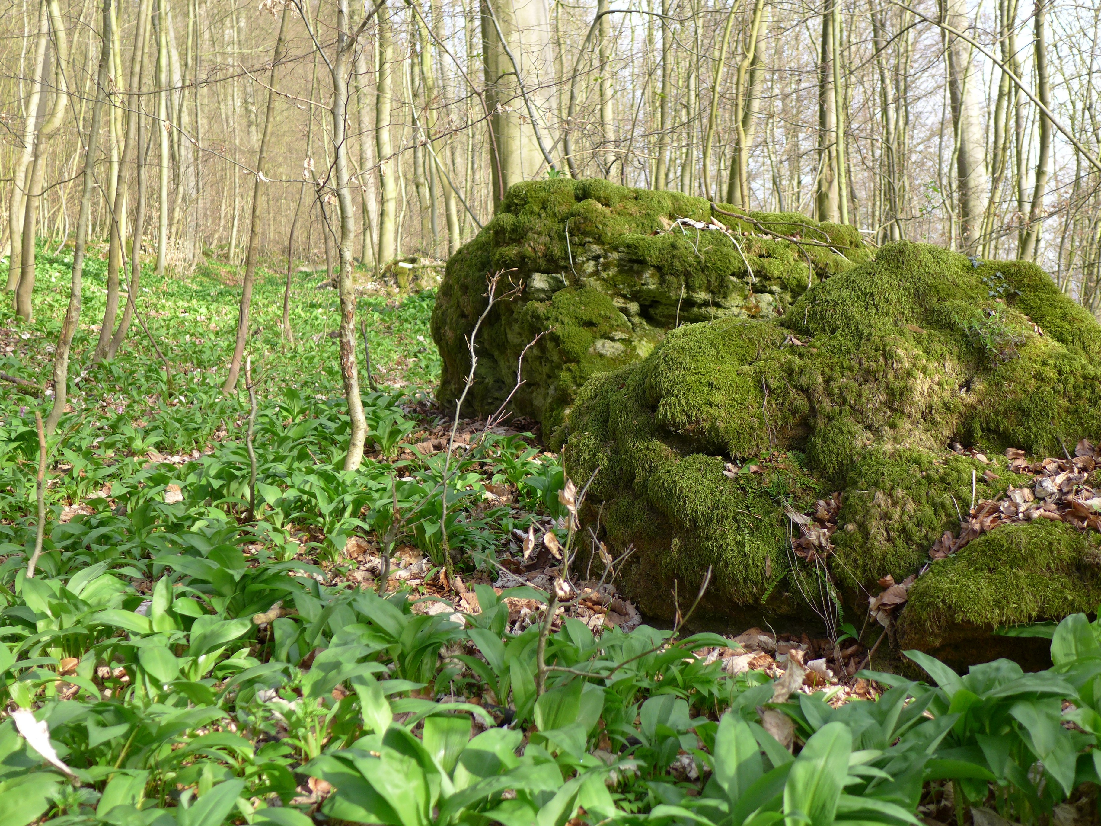 Naturschutzgebiet „Selterklippen“ bei Erzhausen, Bärlauch (Allium ursinum) und bemooster Fels